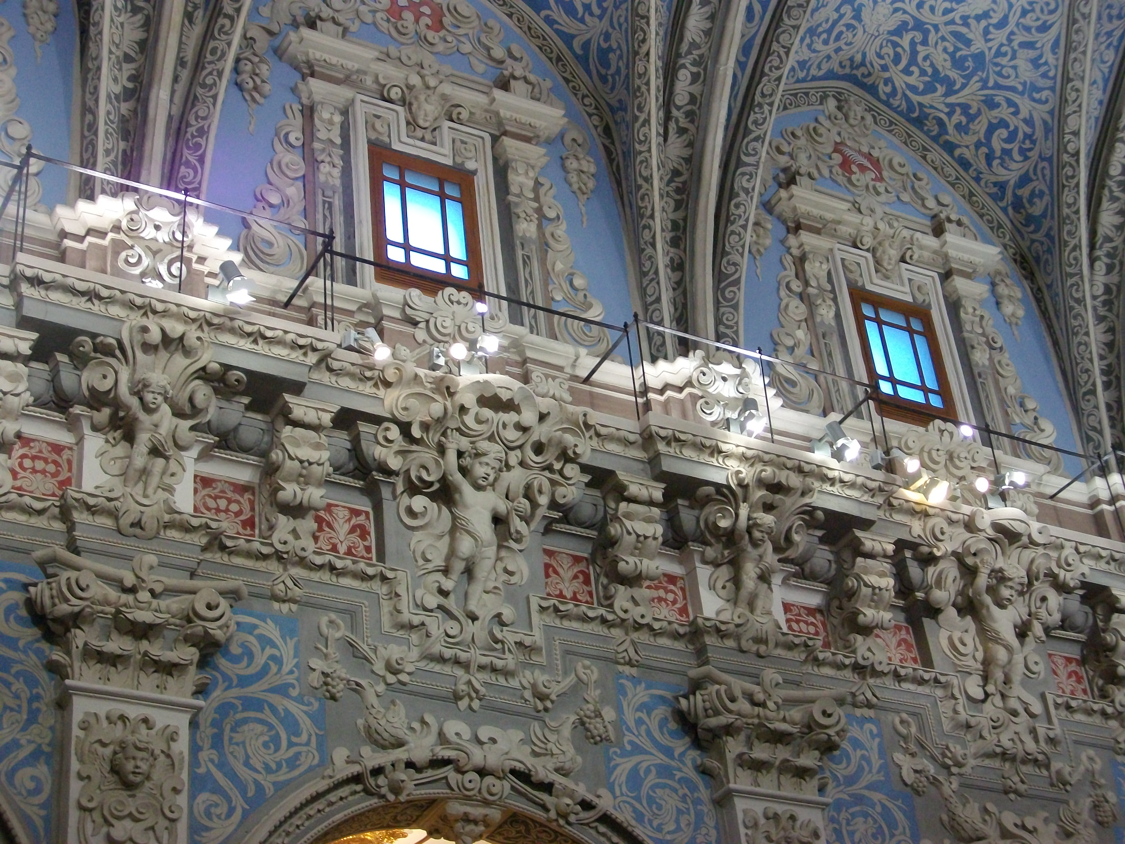 Església de Sant Esteve de València, barroc.